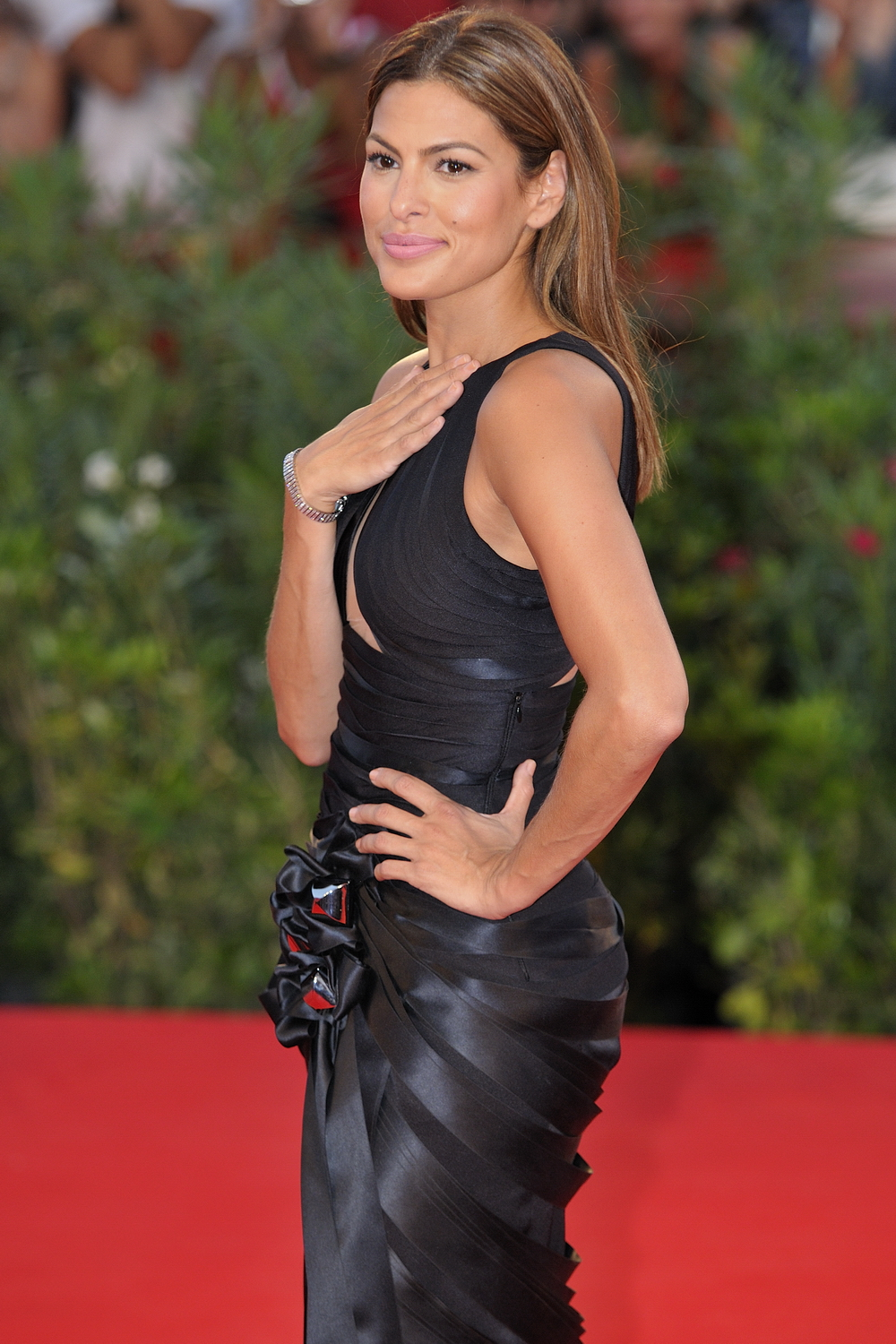 66ème Festival du Cinéma de Venise (Mostra), 3ème jour (04/09/2009) Tapis Rouge avec Nicolas Cage, Eva Mendes et le réalisateur Werner Herzog pour le film : Bad Lieutenant : Port of Call New Orleans